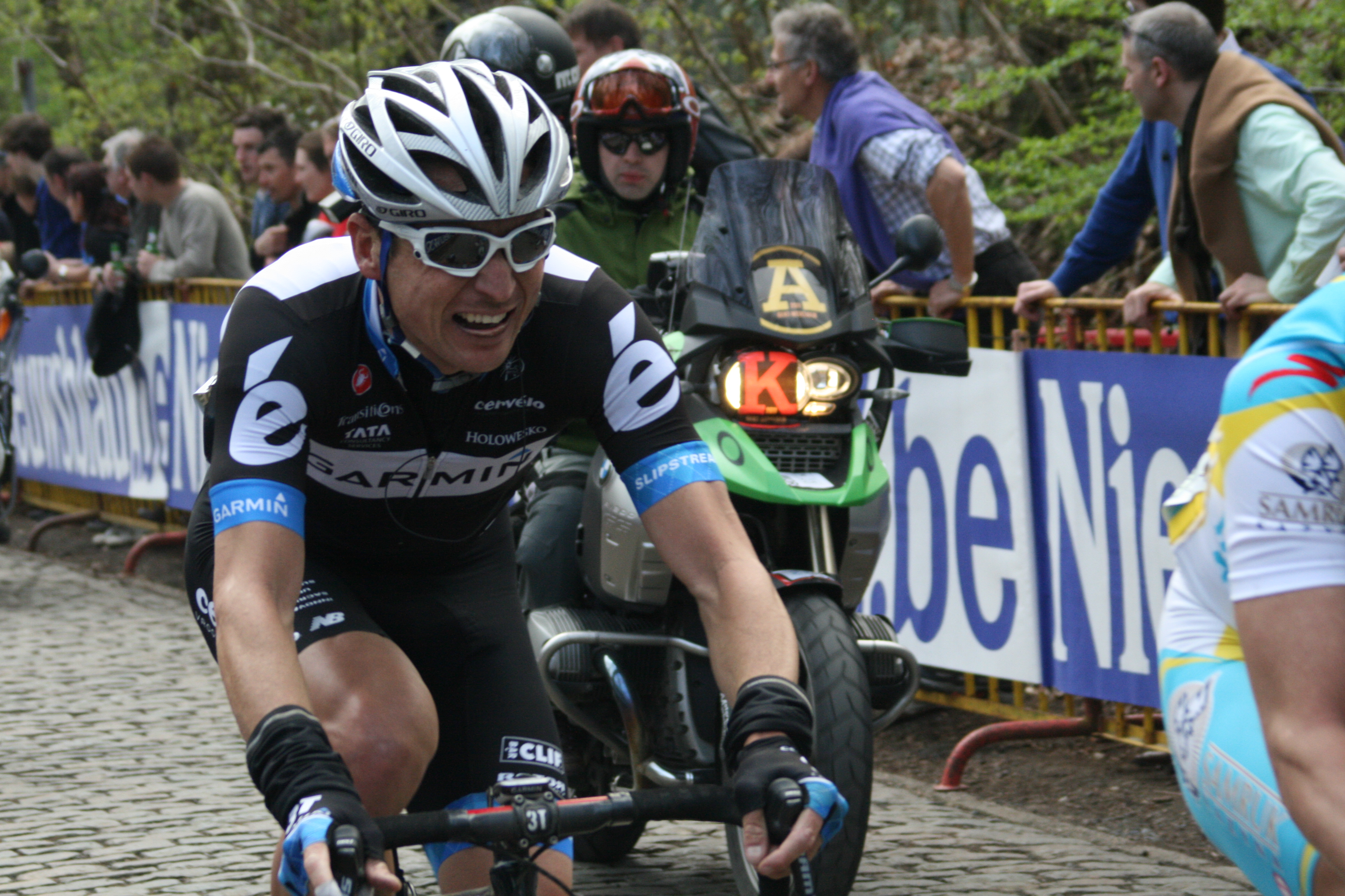 Gent-Wevelgem 2011, Kemmelberg